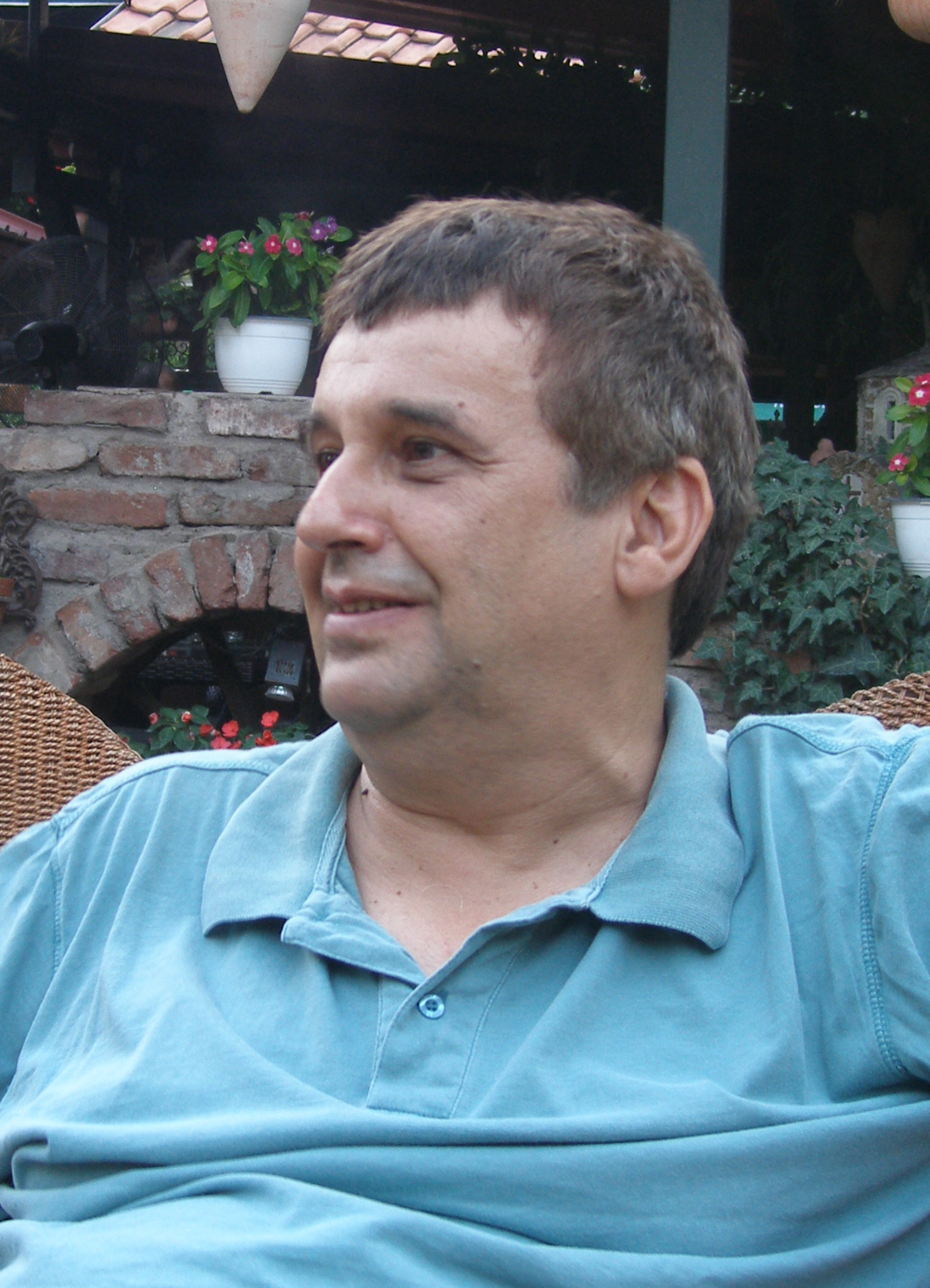 Macedoński pisarz Aleksandar Prokopiew